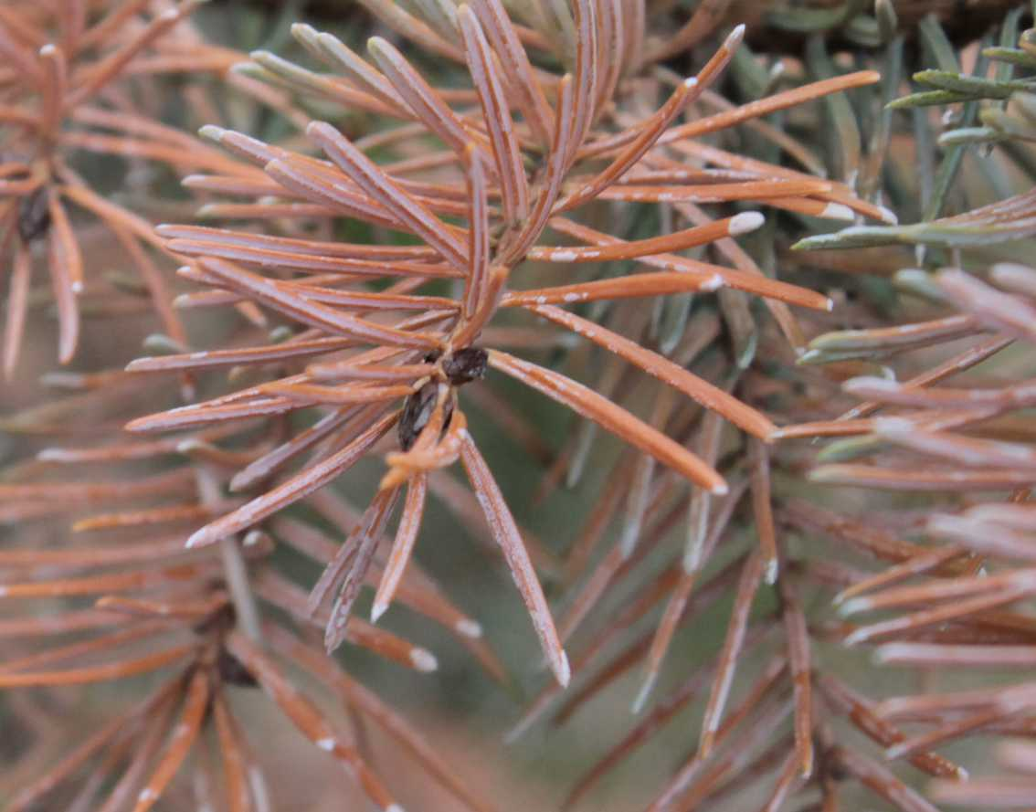 Fyziologická sypavka je choroba jehličnanů způsobená abiotickými faktory. Náhlé silné oteplení během mrazivého jara může poškodit dřeviny. Dochází k silné transpiraci v období, kdy je půda ještě zmrzlá a rostlina trpí nedostatkem dostupné vody. Brno Komín, smrk omorika Picea omorica